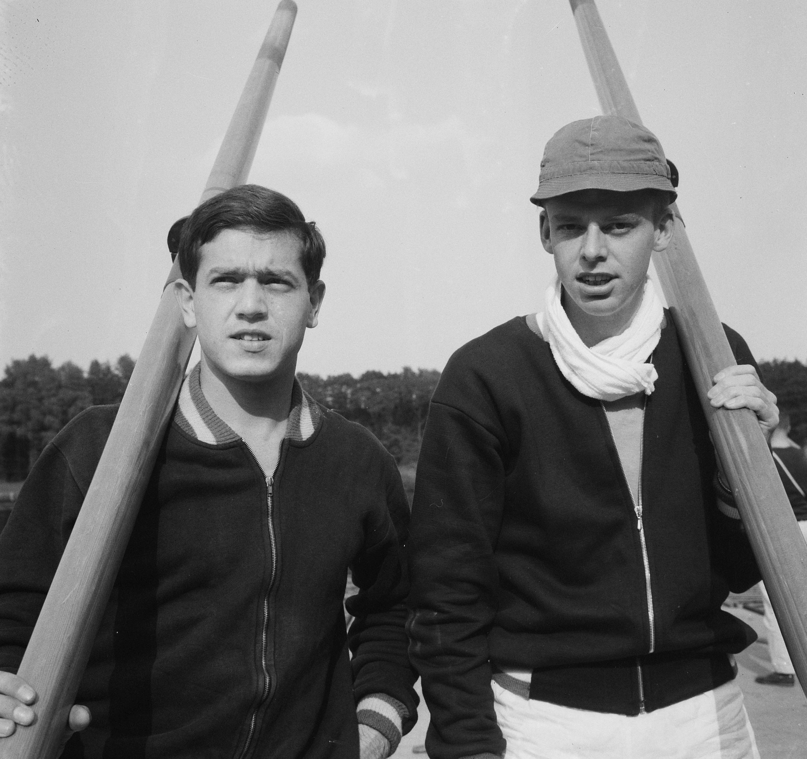 Europese Roeikampioenschappen, Enters (links), Boelen (koppen), twee zonder stuurman